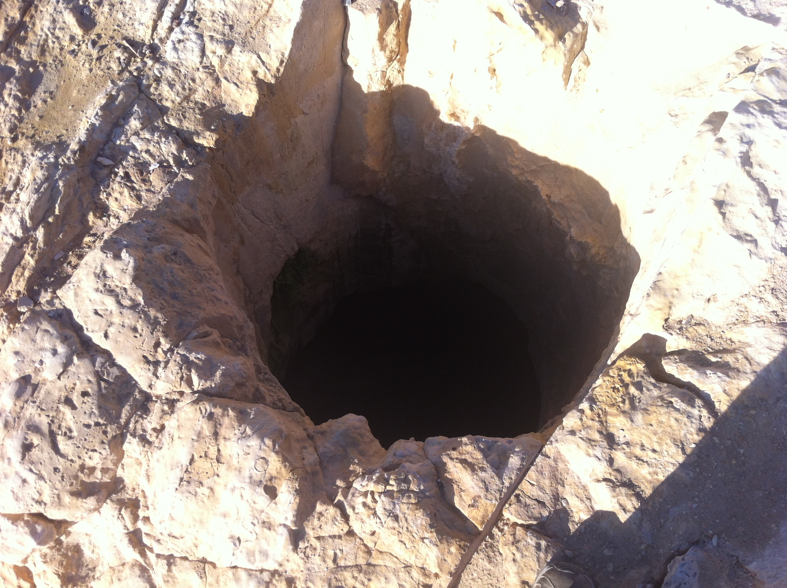 בור מים למרגלות חורבת עוזה